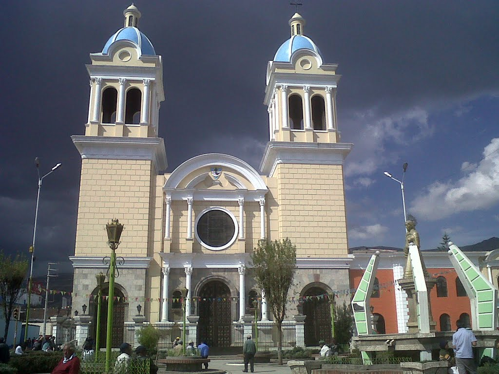 Iglesia María Inmaculada - Huancayo